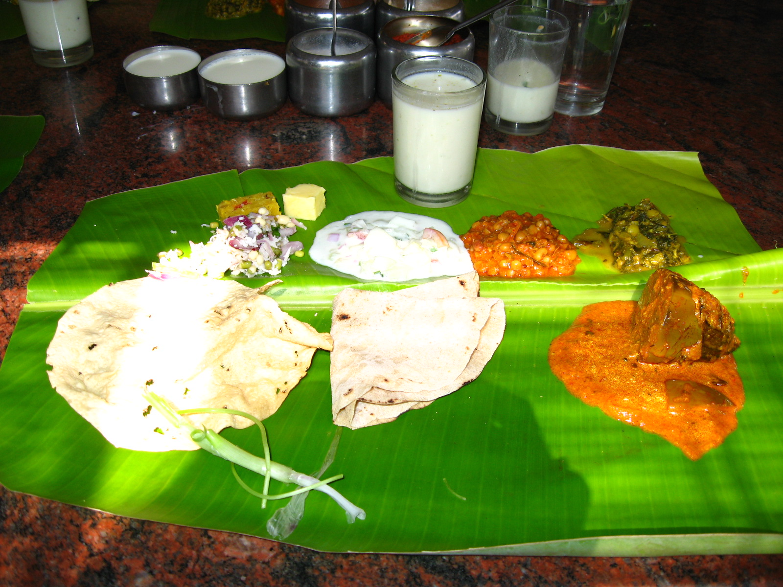 Typical North Karnataka(Uttar Karnataka) meal at Kamath Yatri Nivas, Bengaluru.